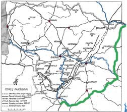 Rytinė Lietuvos siena pagal 1920 m. liepos 12 d. Lietuvos - Tarybų Rusijos sutartį, kuria Lietuvai pripažintas Gardinas ir kitos etninės žemės